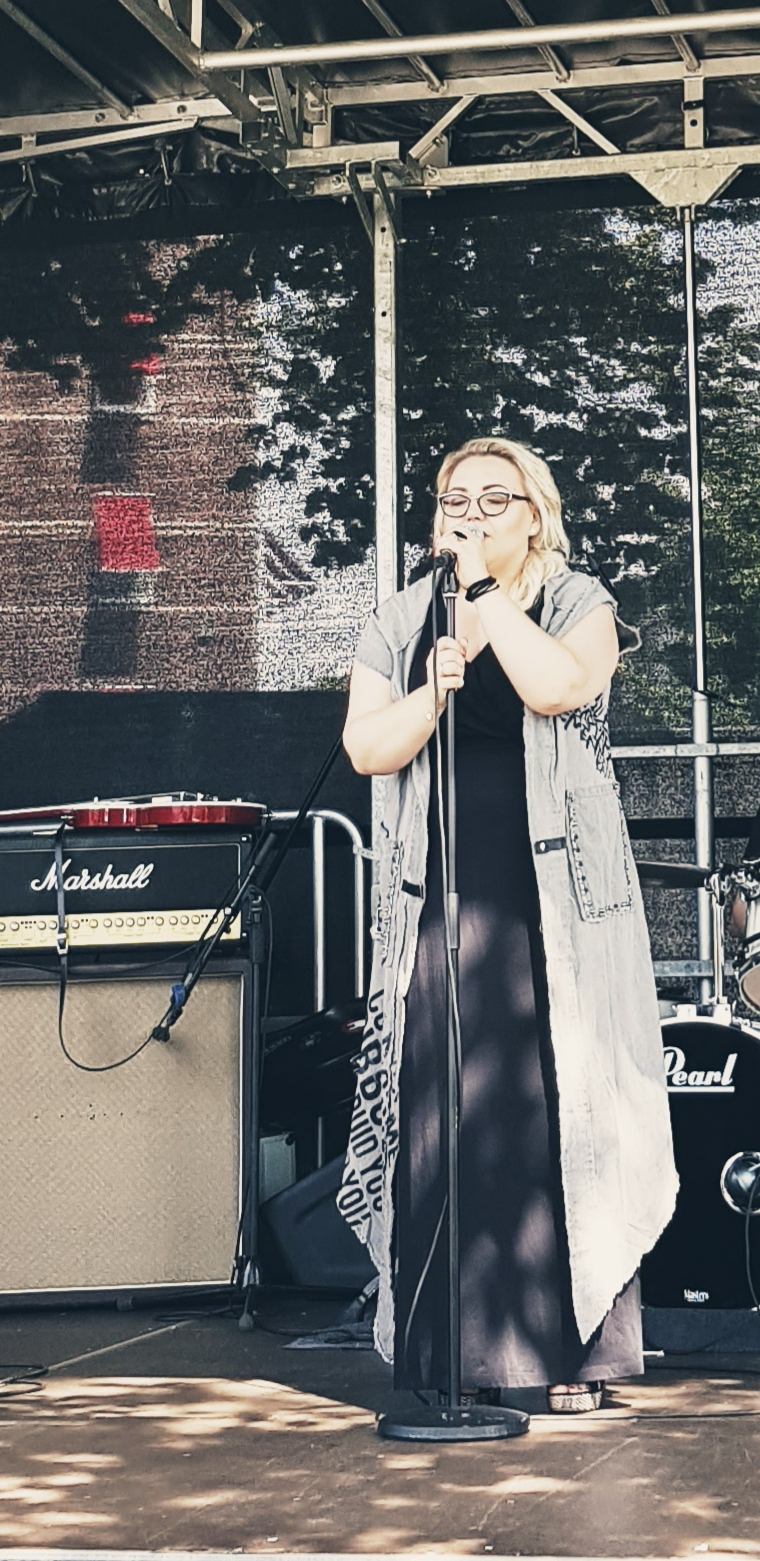 Madlen koncert, Holandia, 2019